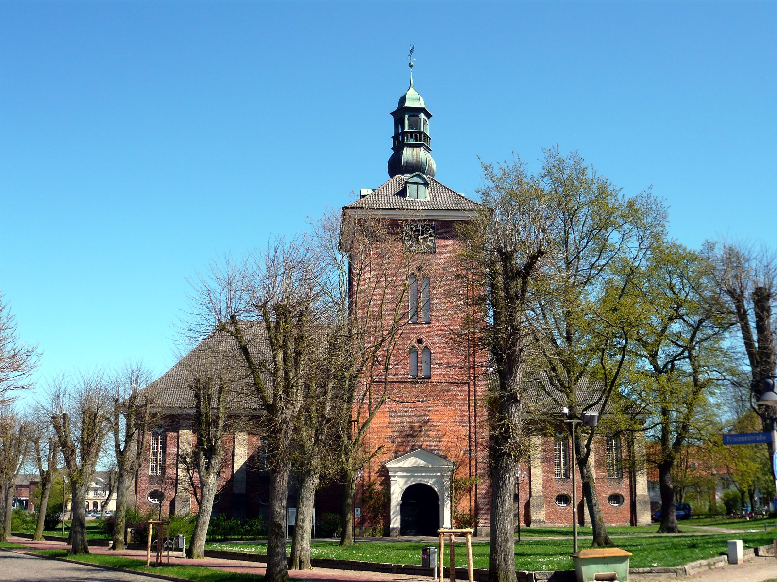 Die Christkirche in Rendsburg. Als Garnisonskirche 1700 eingeweiht.